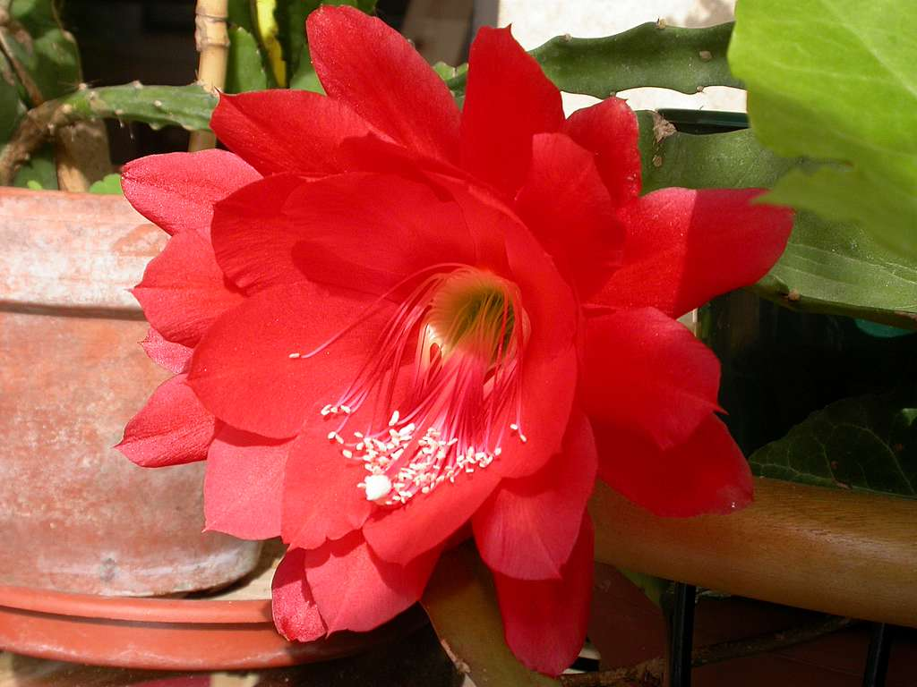 Disocactus ×hybridus - Mai 2006